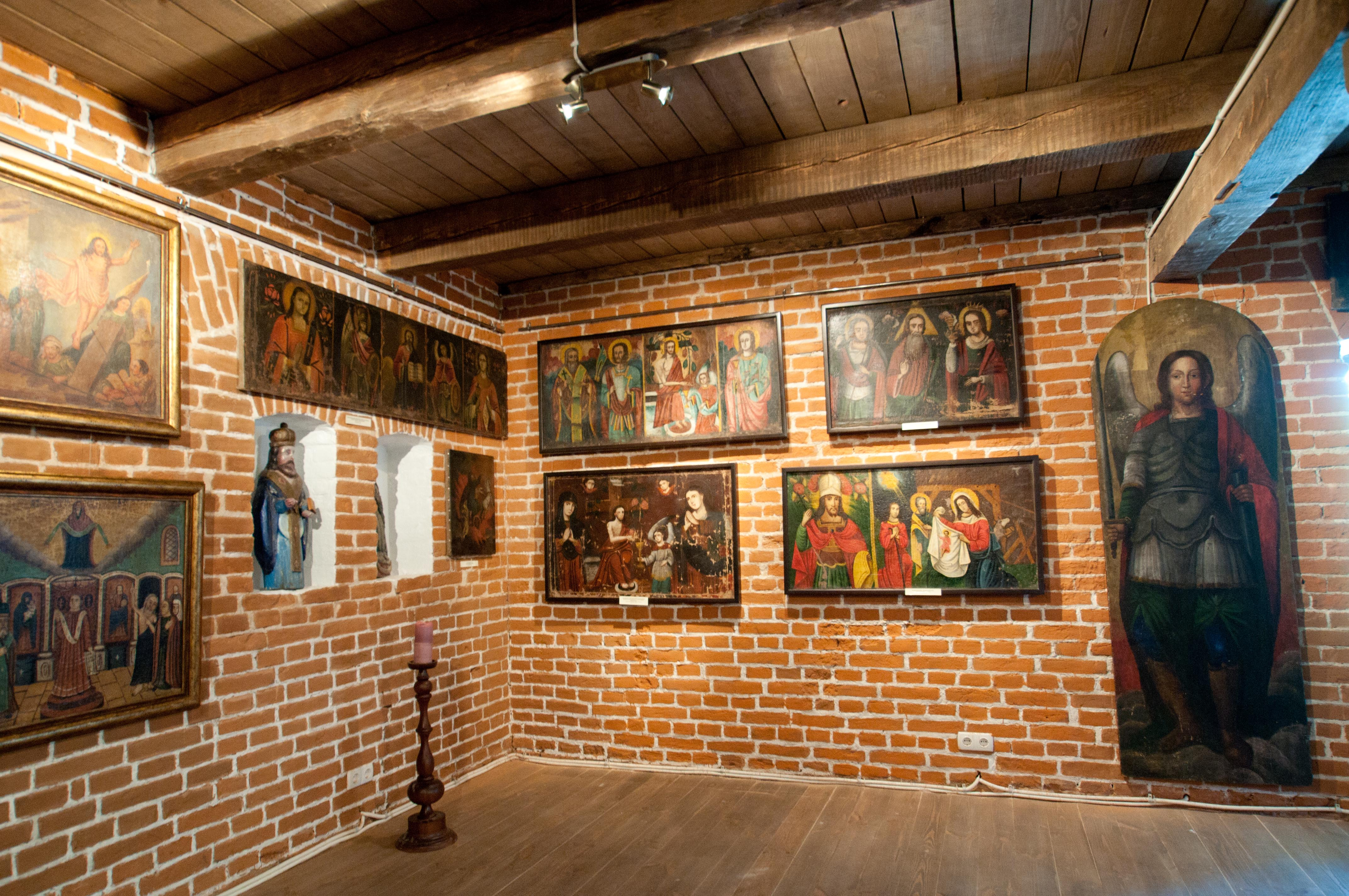 Фрагмент экспозиции. Домашние иконостасы.